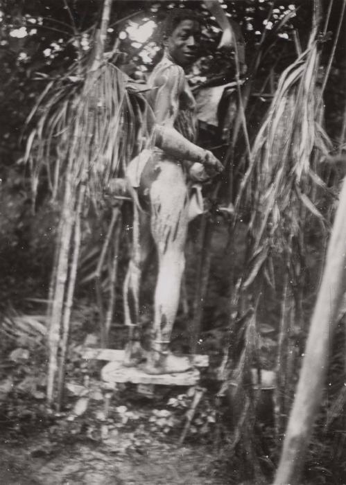 Foto. Witte klei (pemba dotee, pemba dotti of pimba doti, ook wel pijpaarde genoemd), wordt gebruikt voor het insmeren van amuletten en andere voorwerpen die verband houden met magie en ritueel. Pemba dotti is een witte klei die voornamelijk in moerasgebieden voorkomt. Deze witte klei wordt niet, in tegenstelling tot wat men vaak denkt, gebruikt om de doden te verdrijven, maar om één met hen te worden. Het wit maken van het lichaam geeft de persoon de mogelijkheid om niet uit de toon te vallen bij de goden of geesten. Pemba dotti wordt vooral opgesmeerd door de Marrons die tijdens Winti rituelen dichter bij hun voorouders willen komen om hen hulp en/of advies te vragen. De pemba dotti wordt niet alleen gebruikt voor het insmeren van het lichaam, maar ook van de muziekinstrumenten die gebruikt worden bij het oproepen van de winti. . Een met witte klei ingesmeerde Marron